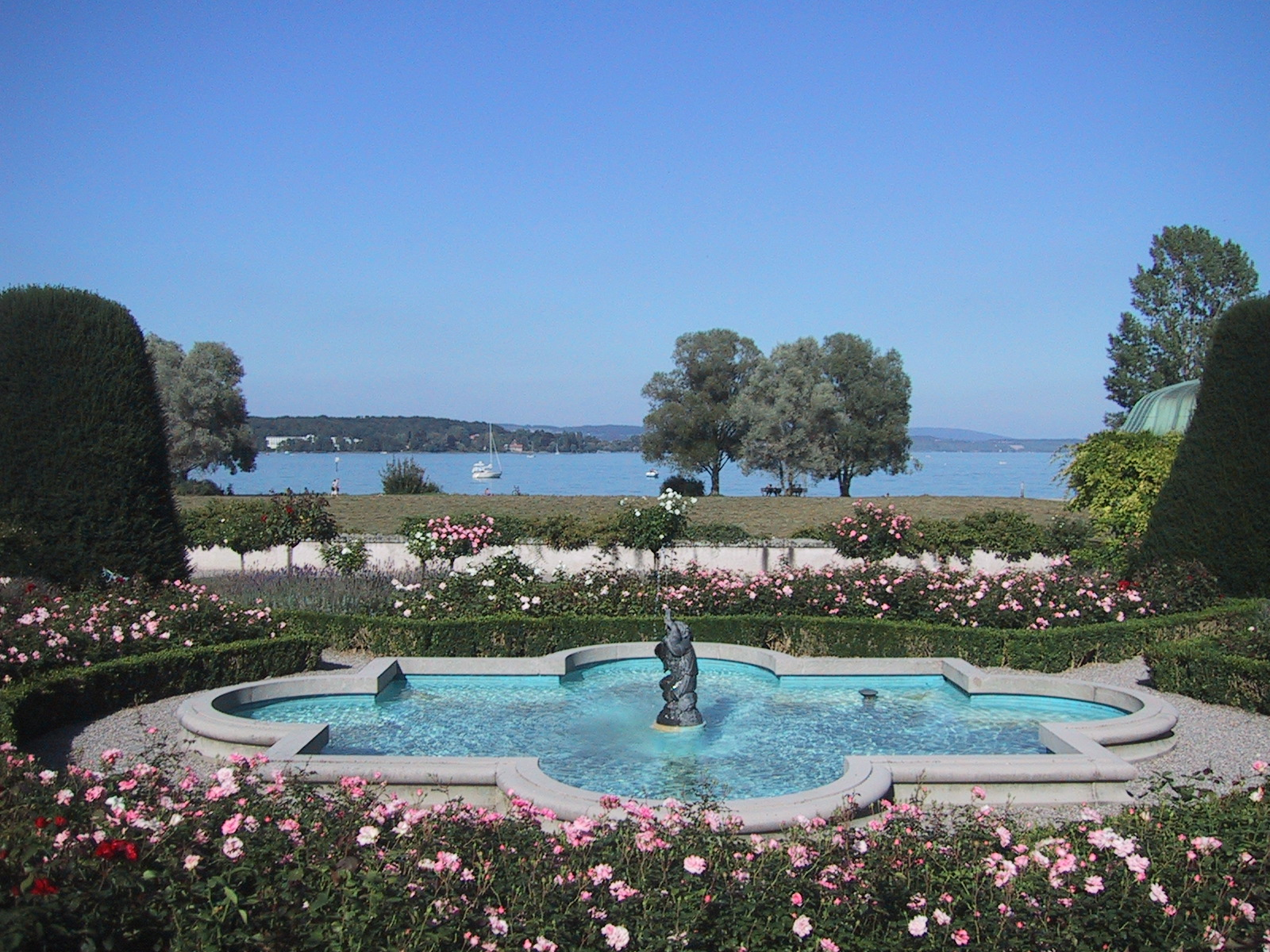 Blick von der Seeburg gegen Norden auf den Bodensee, Kreuzlingen, Kanton Thurgau